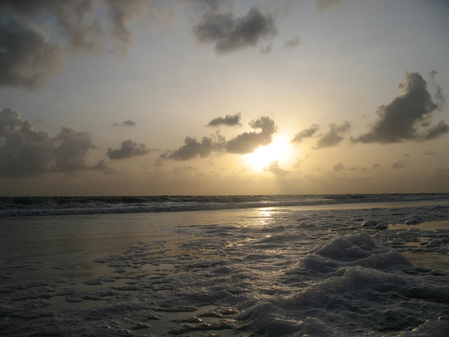 Nascer do Sol na praia de Ajuruteua - Pará - Brasil